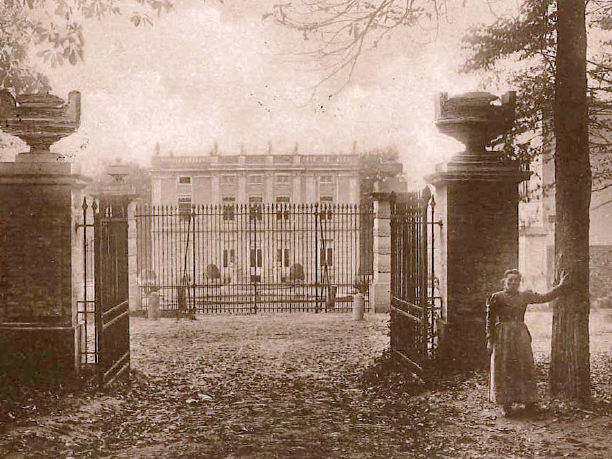 Le château Zaman, à Forest en Belgique, avant 1880. Photo prise depuis l'actuel croisement de l'avenue du Domaine et de l'avenue Minerve.